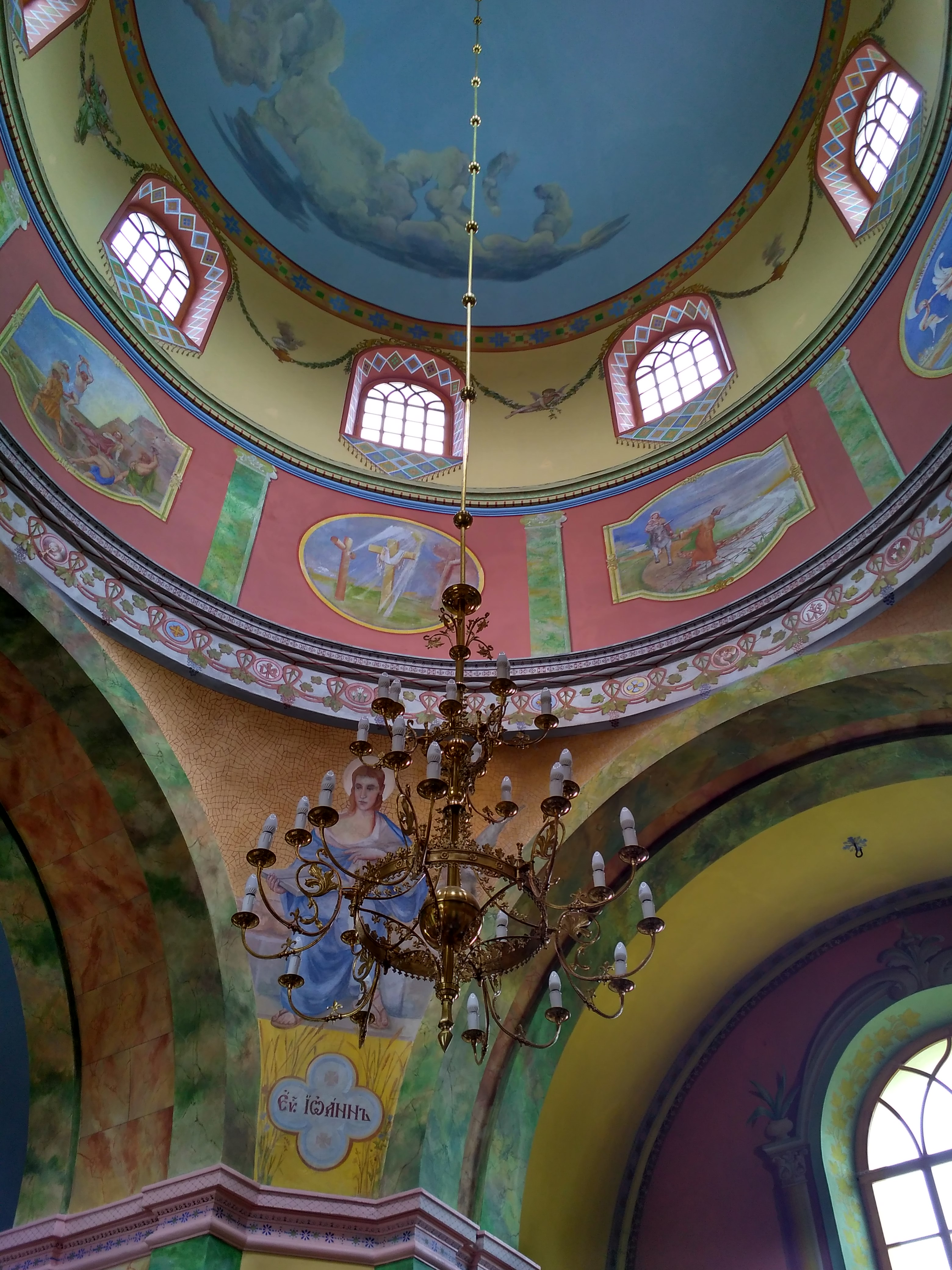 фрагент-реставрованої-церкви-чесанів-2016